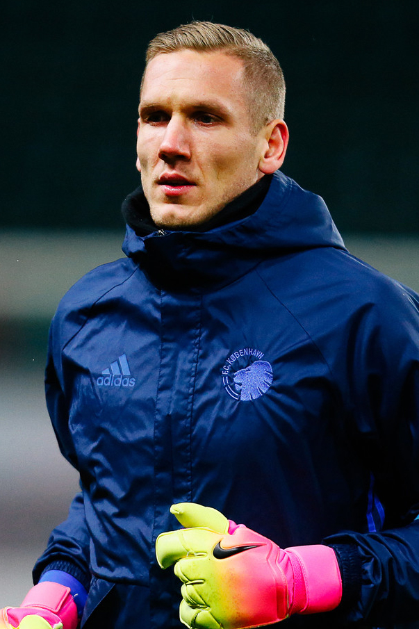 «Копенгаген» опробовал поле «РЖД Арены»